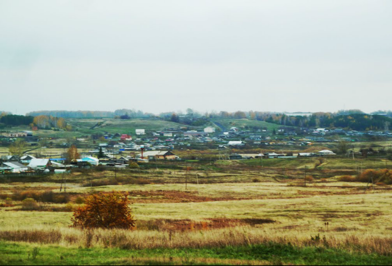 вид с поселка восход